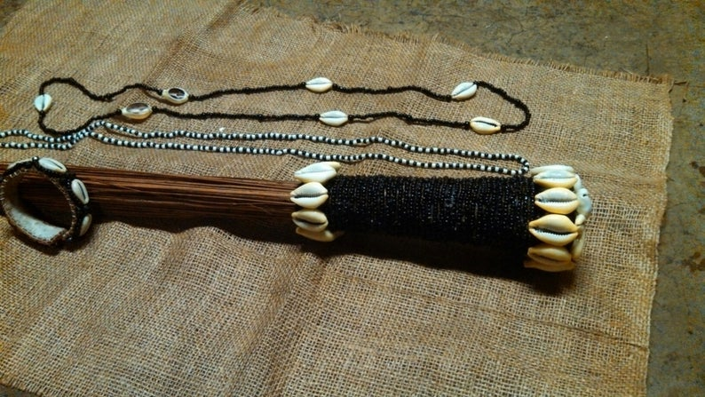 Ajá. Pertenece al Panteón Yoruba, como un Orisha menor de la Religión Yoruba